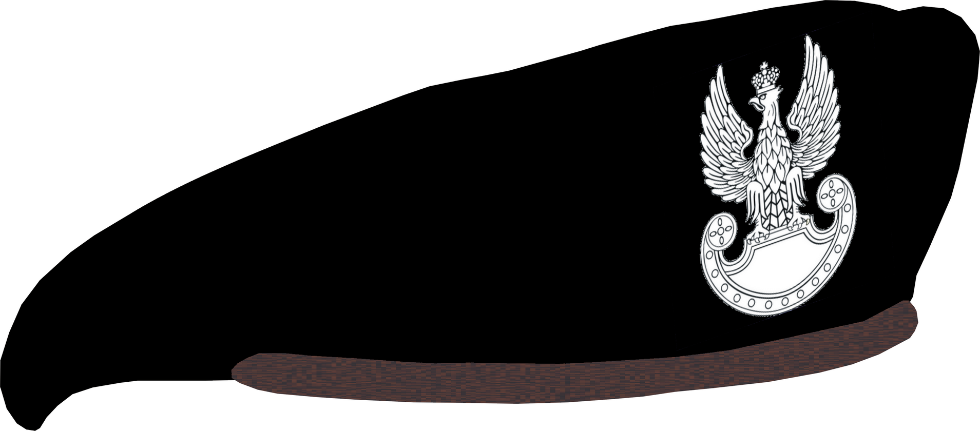 Beret używany w siłach zbrojnych Rzeczypospolitej Polskiej - czarny